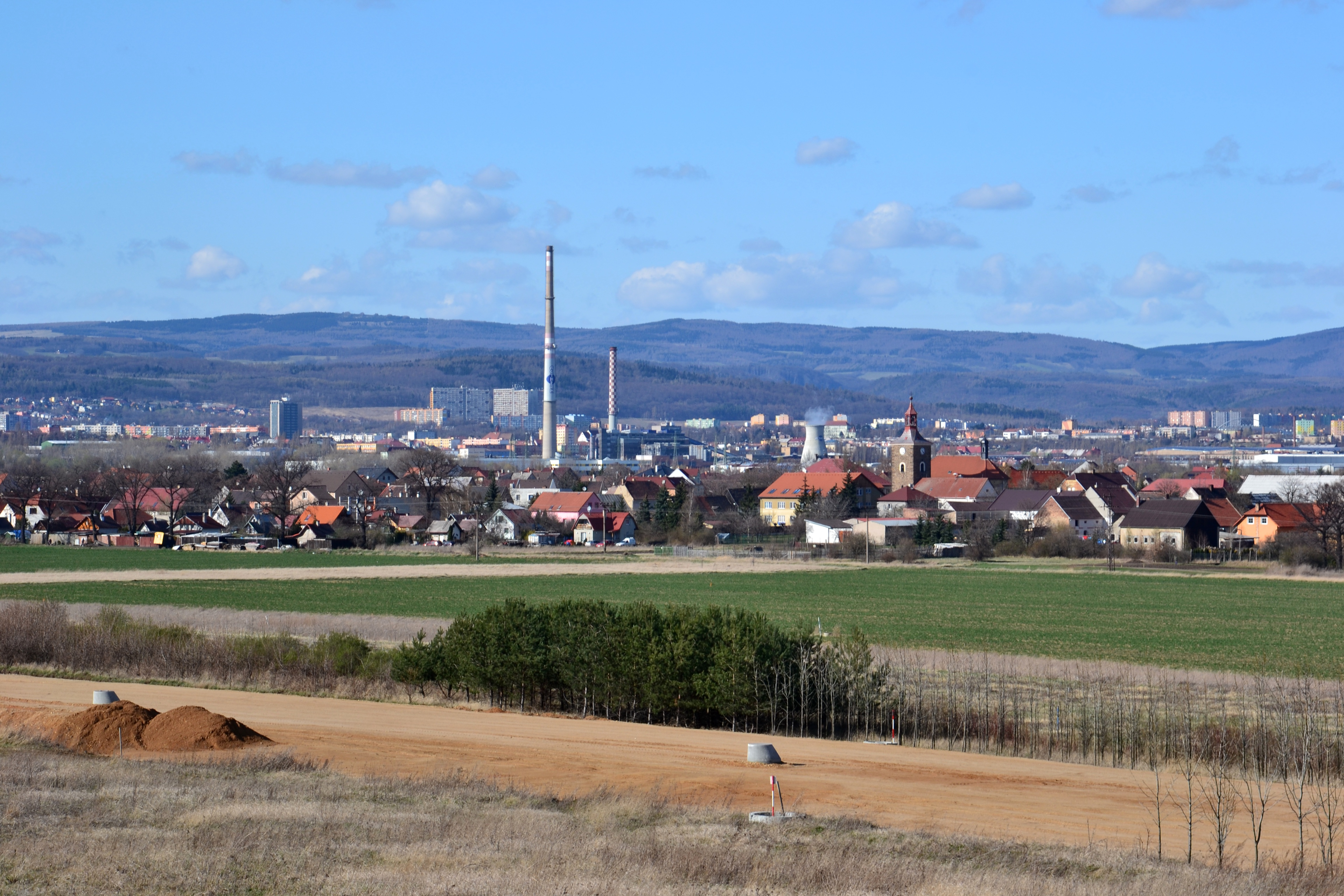 Droužkovice - celkový pohled od Březenského tunelu s rozestavěnou silnicí R7